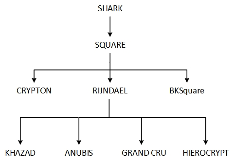 Семейство шифров, произошедшее от шифра SHARK